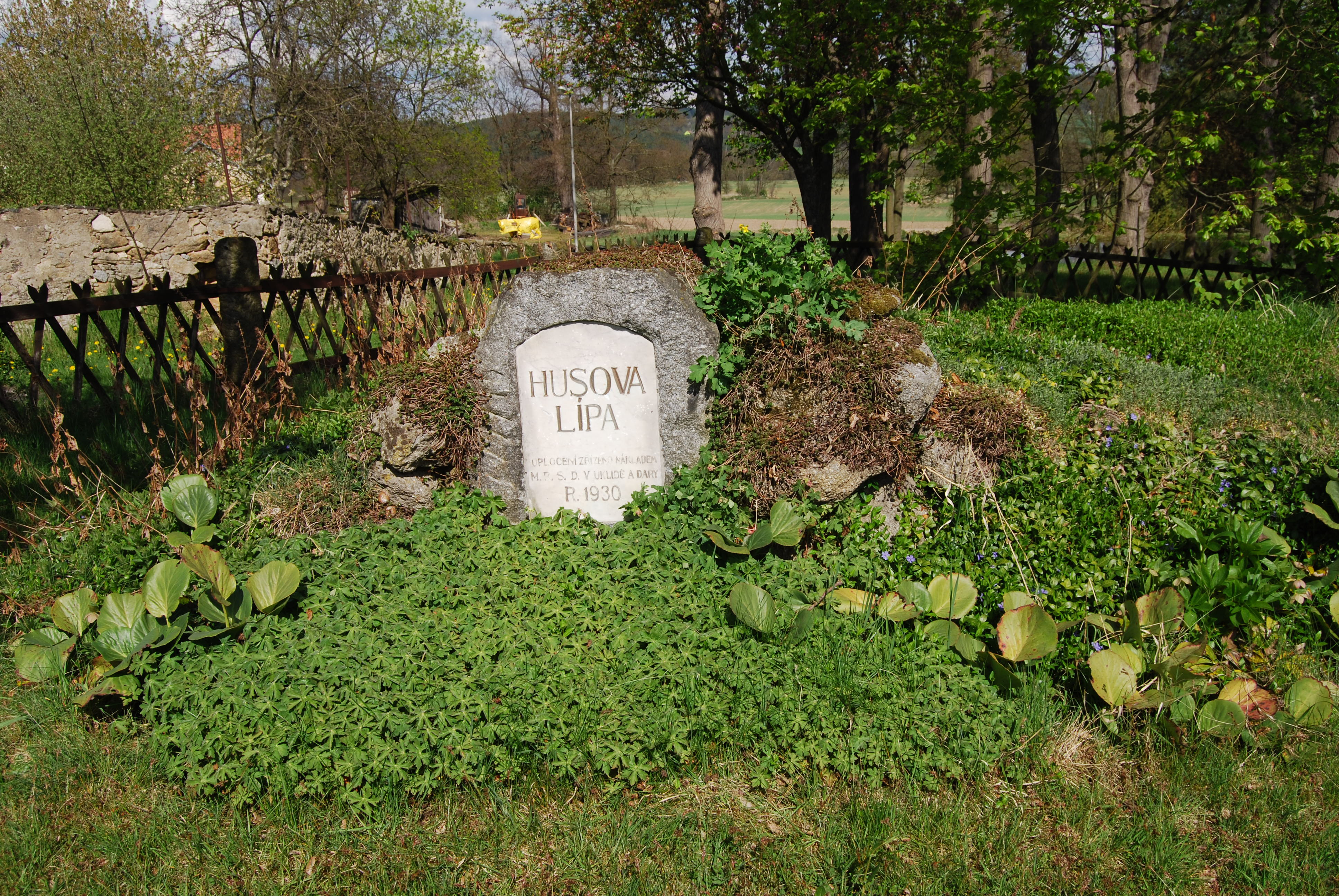 Torzo Husovy lípy. Úklid - část obce Nedrahovice v okrese Příbram. Česká republika.